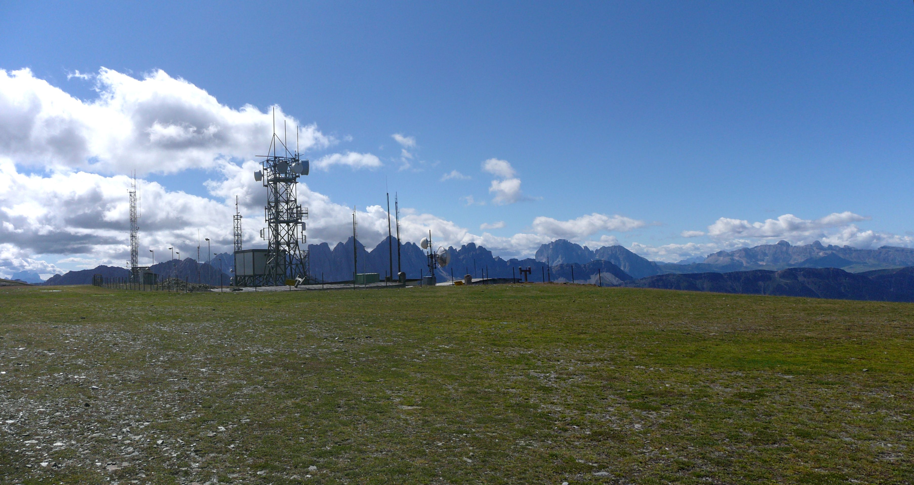 16^ Centro radar con sfondo le Odle